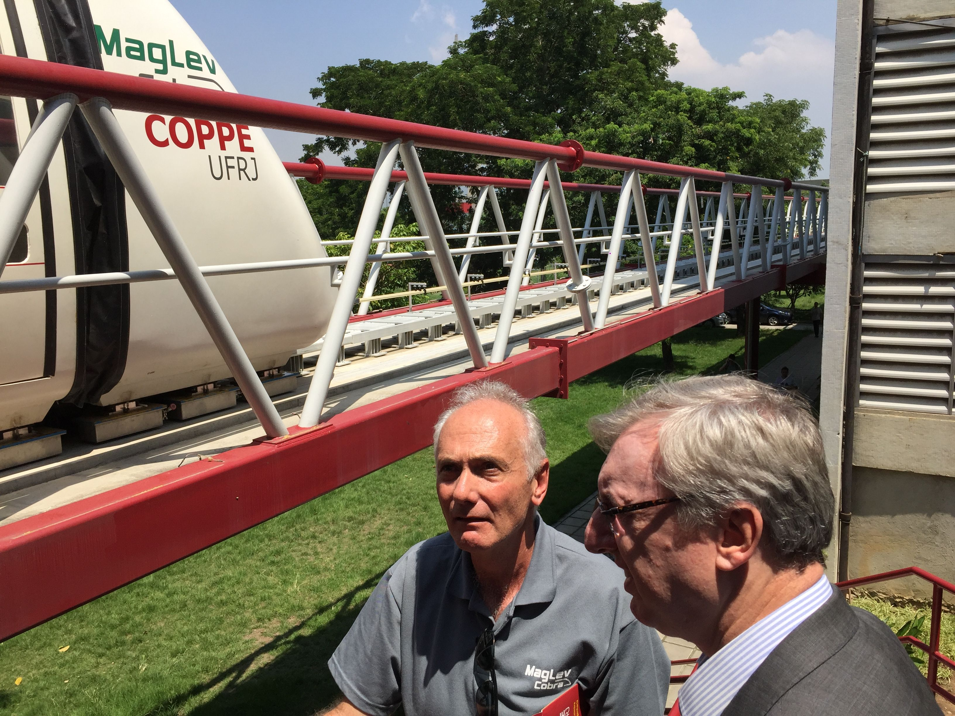 Rio de Janeiro - Ministro da Ciência, Tecnologia e Inovação, Celso Pansera (D), conhece o projeto do Magleve-Cobra, trem de levitação magnética desenvolvido pela Coppe da UFRJ (Cristina Indio do Brasil/Agência Brasil)